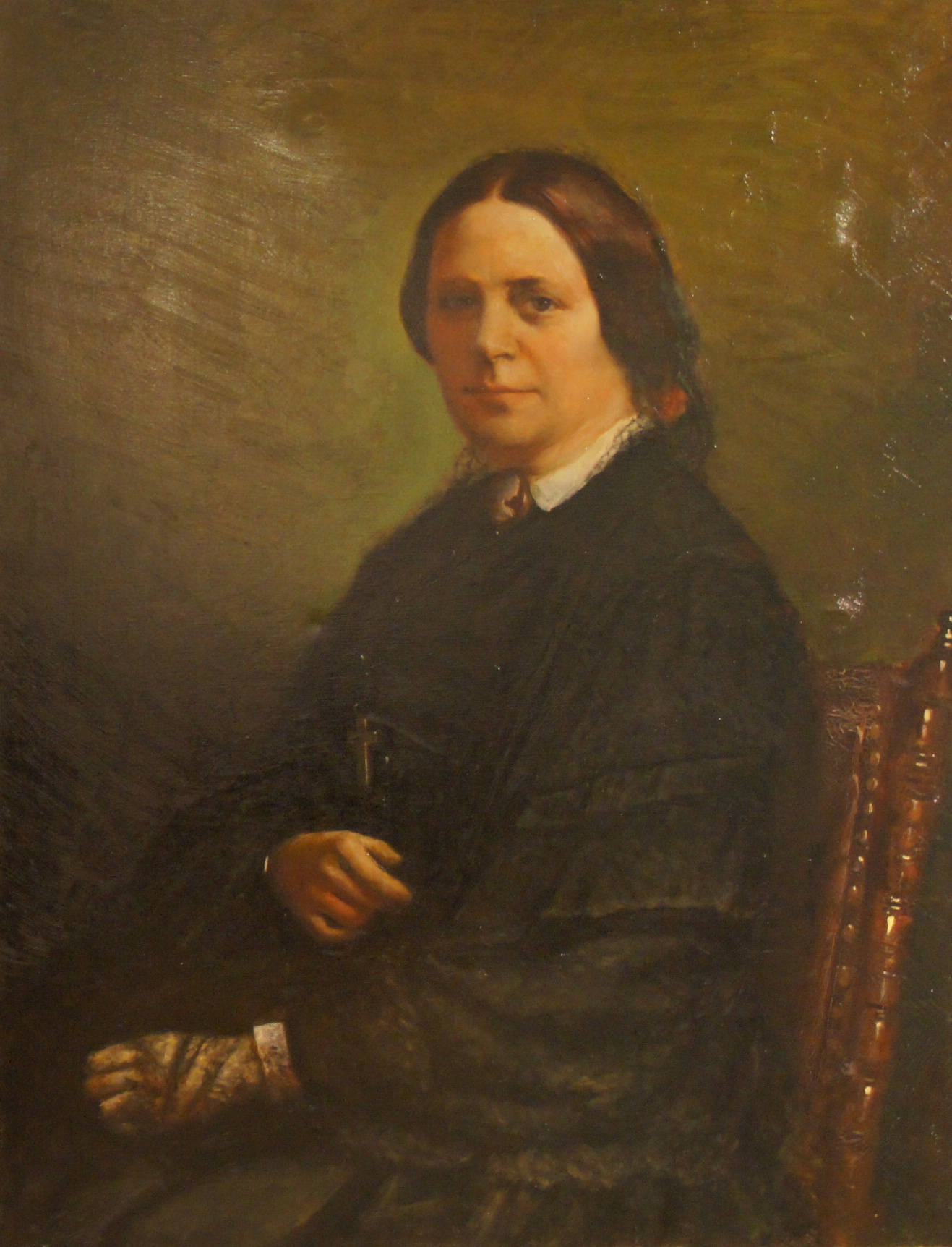 Eugenia Auguste Lutze geb. Lautsch (1823-1900), Pfarrerstochter aus Halberstadt, Ehefrau und Assistentin von Arthur Lutze seit 1847. Kopie eines Gemäldes in der Lutze-Klinik in Köthen (Anhalt), Öl auf Leinwand